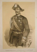 generale e senatore Manfredo Fanti.